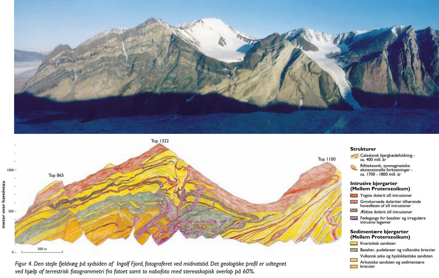 Fotogrammetrisk udtegning af sydsiden af Ingolf Fjord i Nordgrønland